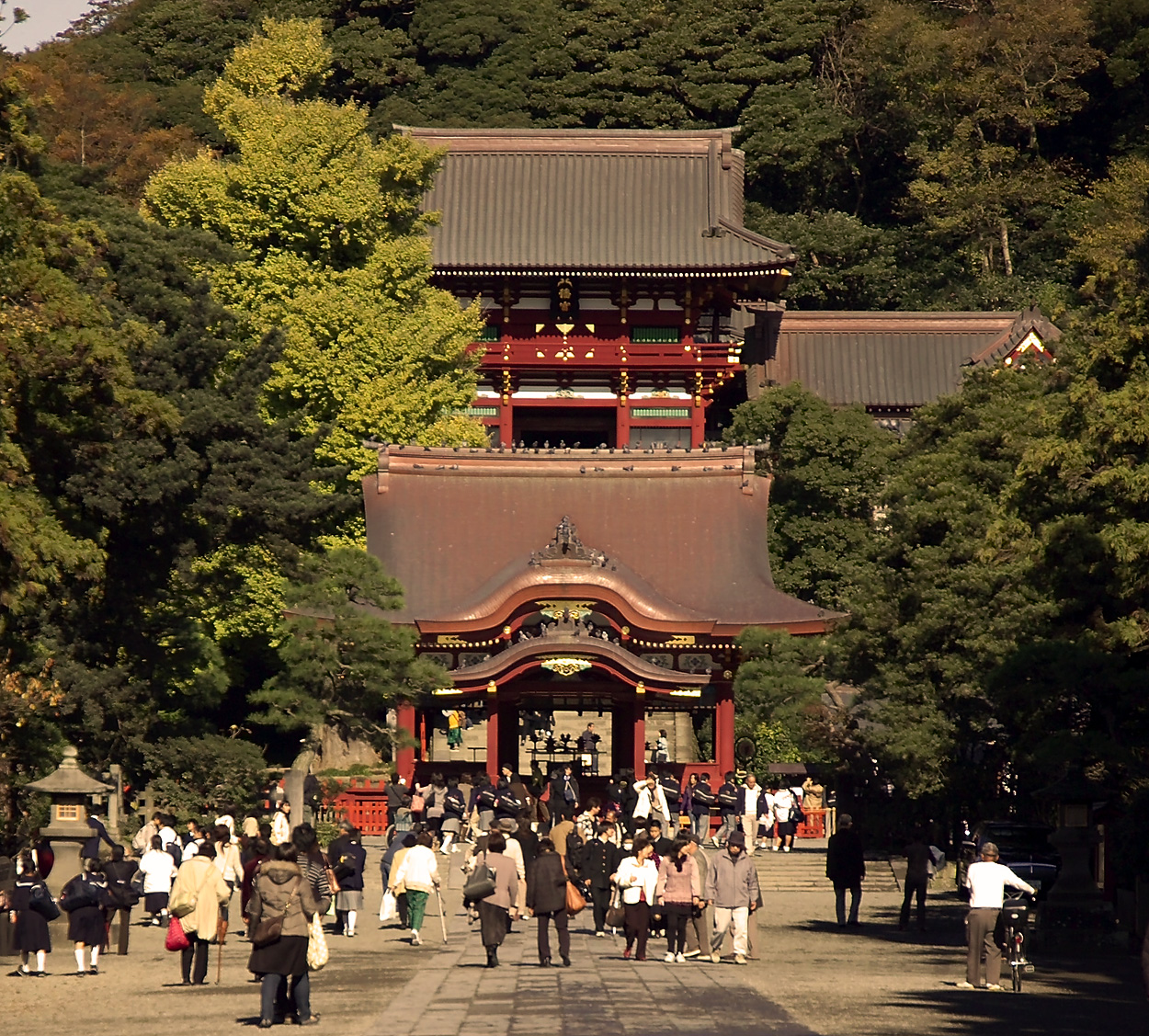 Tsurugaoka Hachiman Shrine in Kamakura, Kanagawa Prefecture, Japan